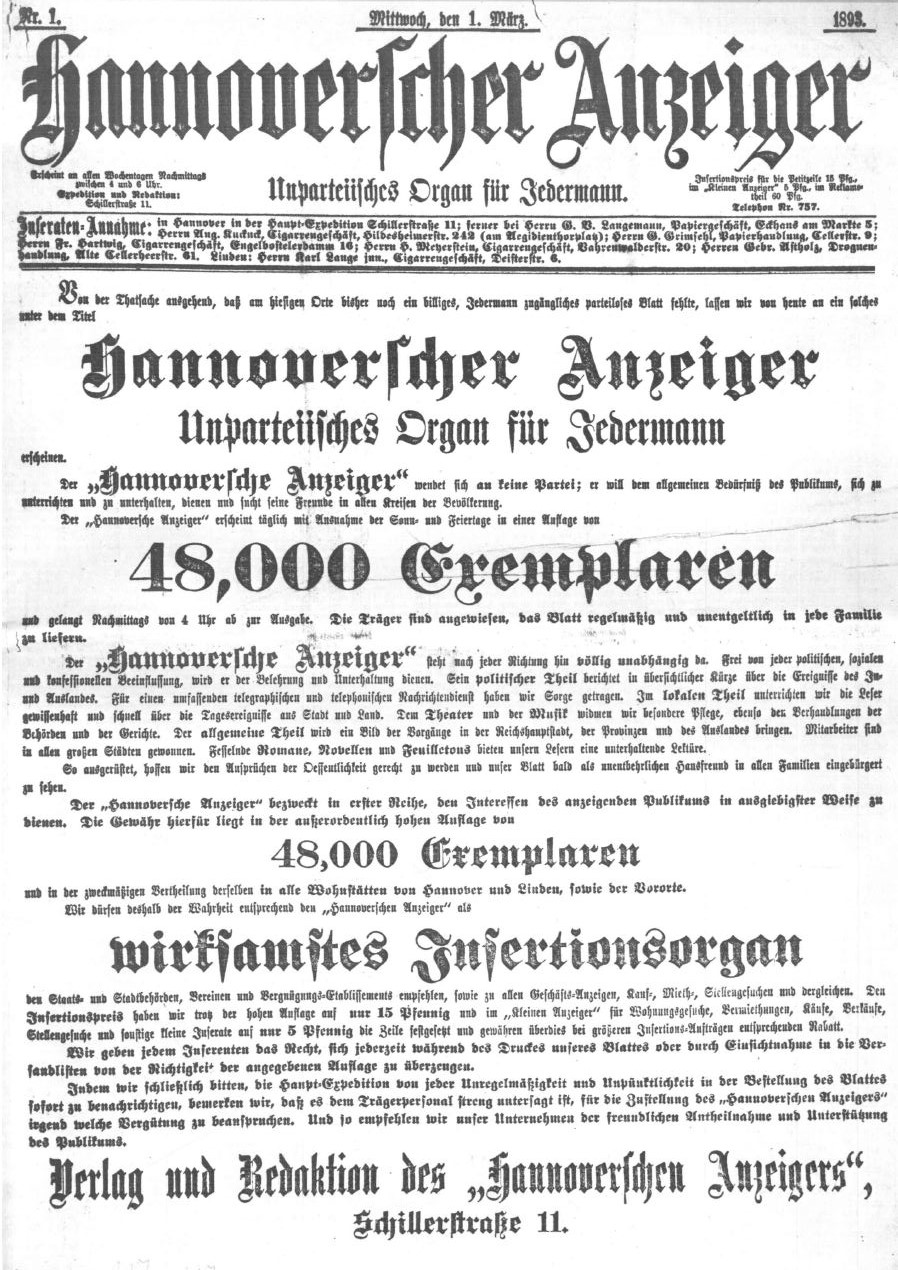 Titelseite Hannoverscher Anzeiger 01.03.1893